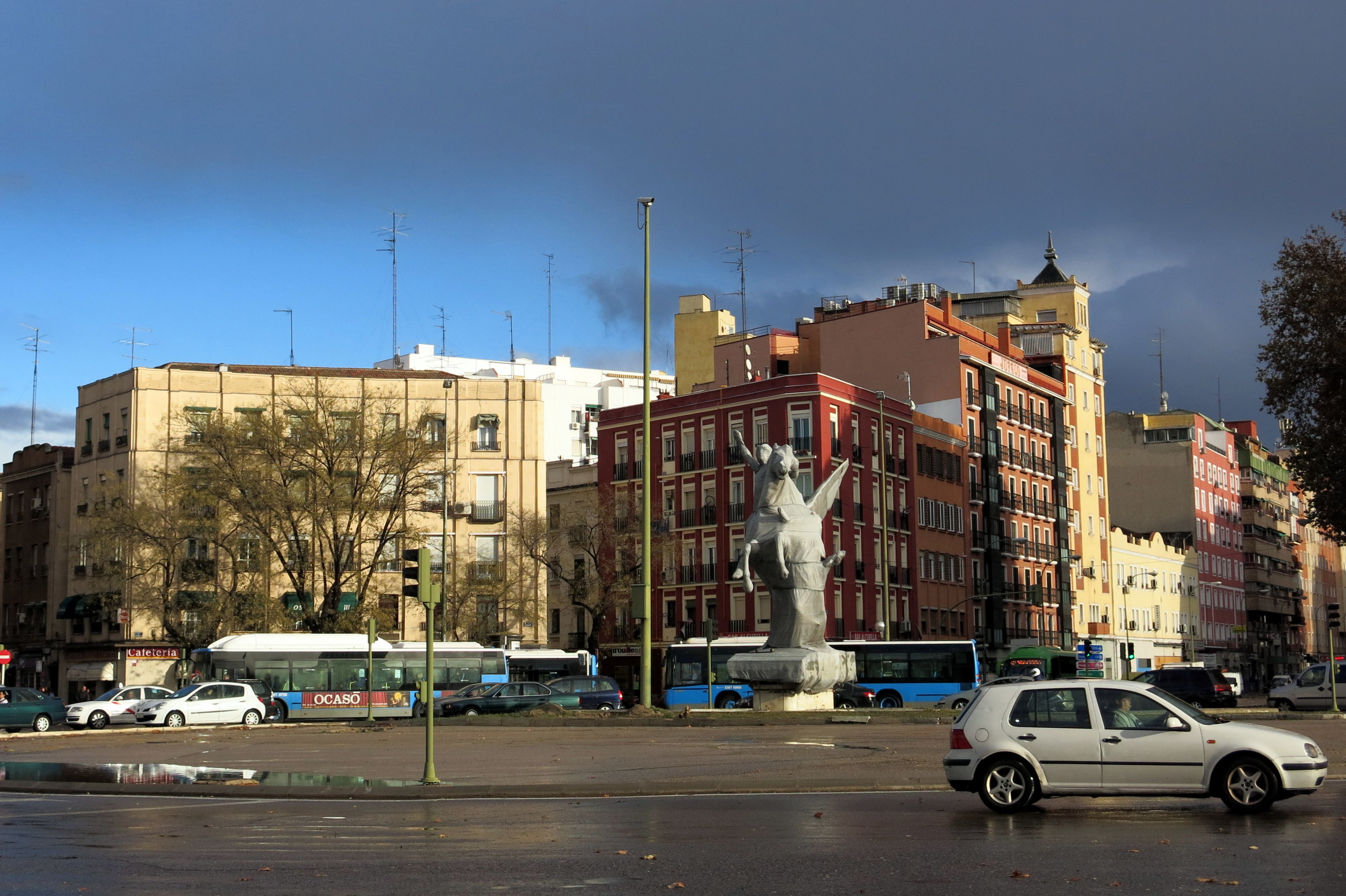 plaza de Legazpi